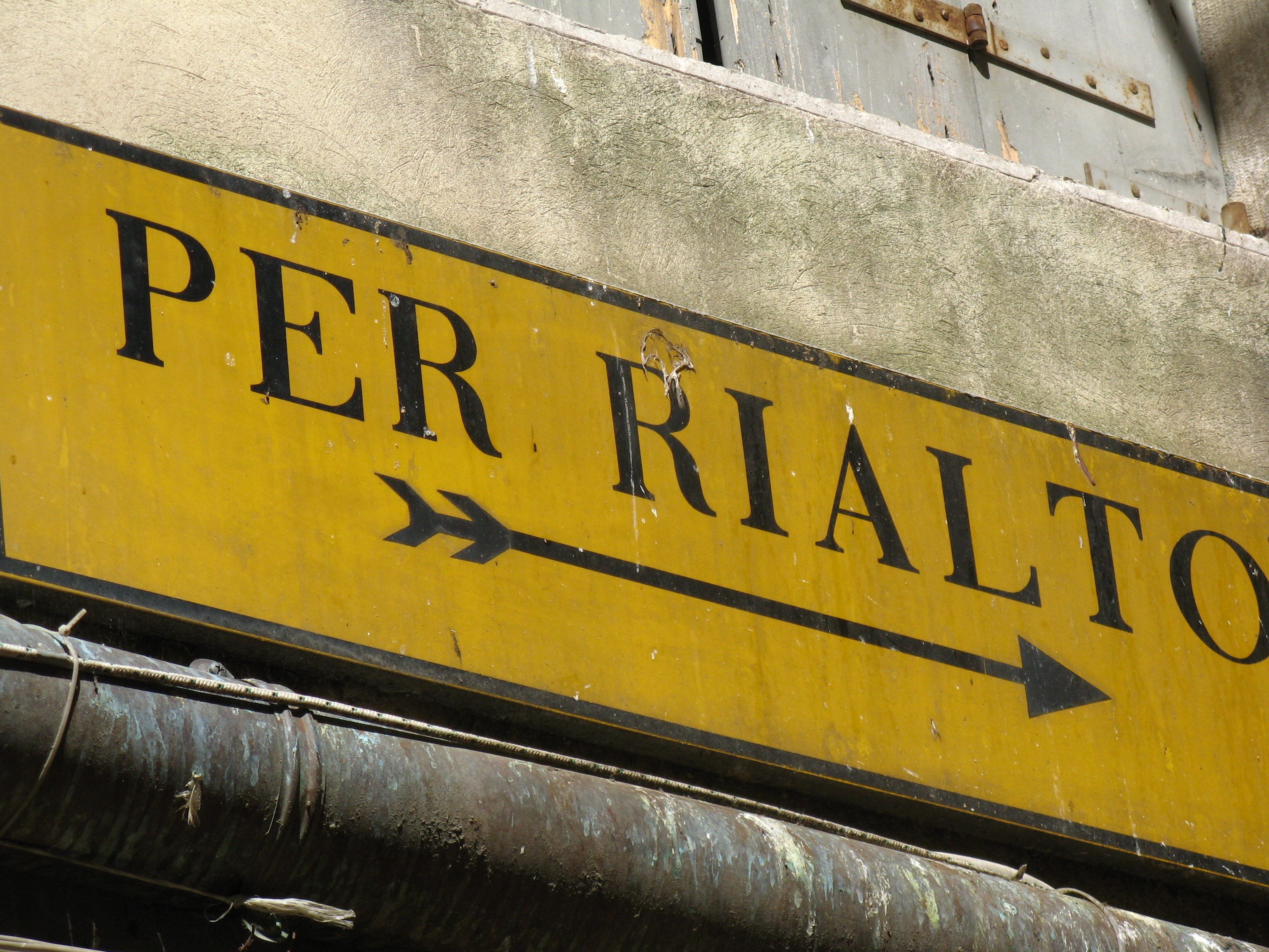 Wegweiser zur Rialto Brücke